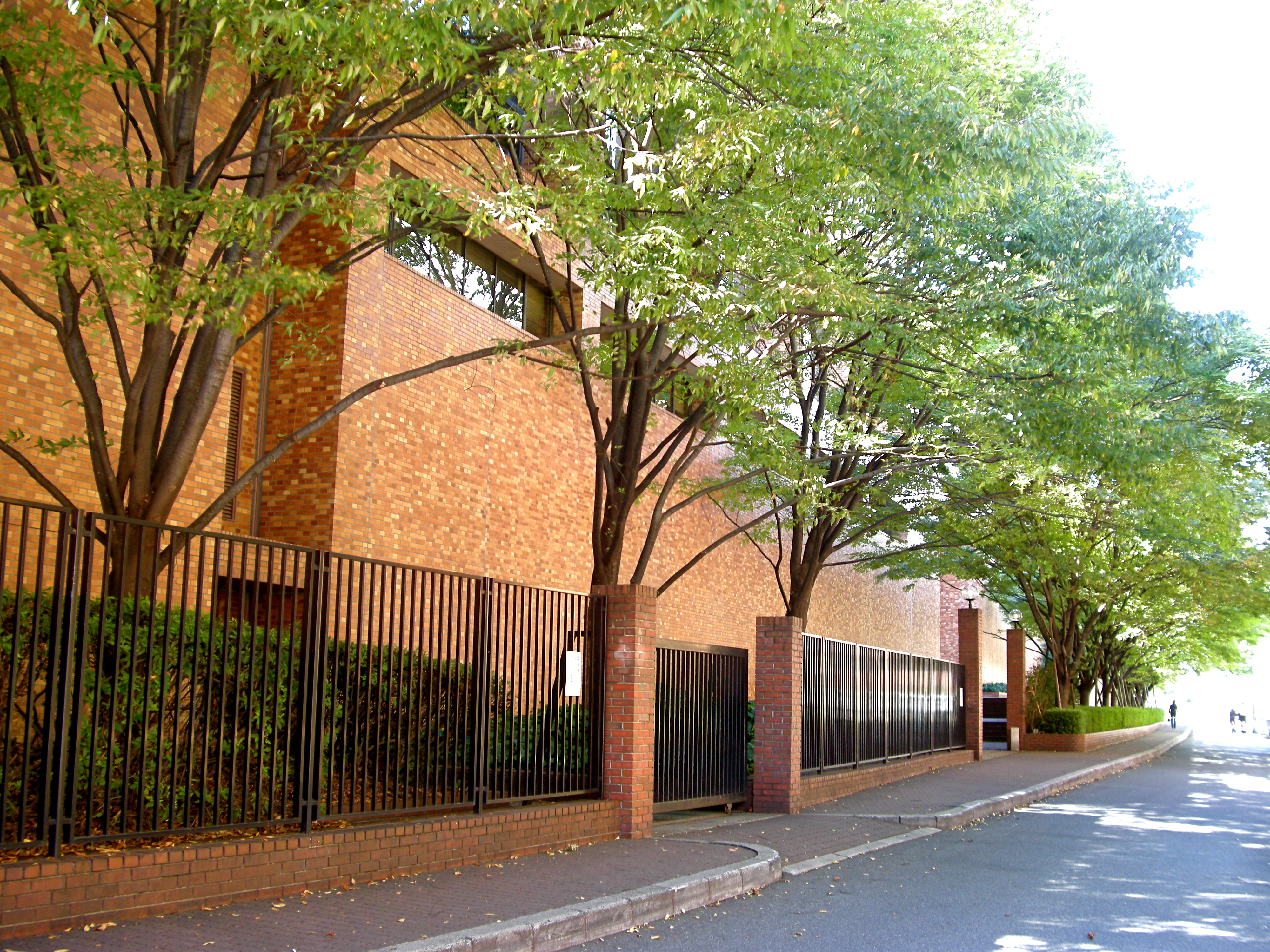 Osaka Gakuin University (Osaka, Japan)